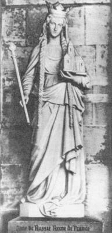 Статуя XVII века «Анна русская, королева Франции» (Санлис, Франция)